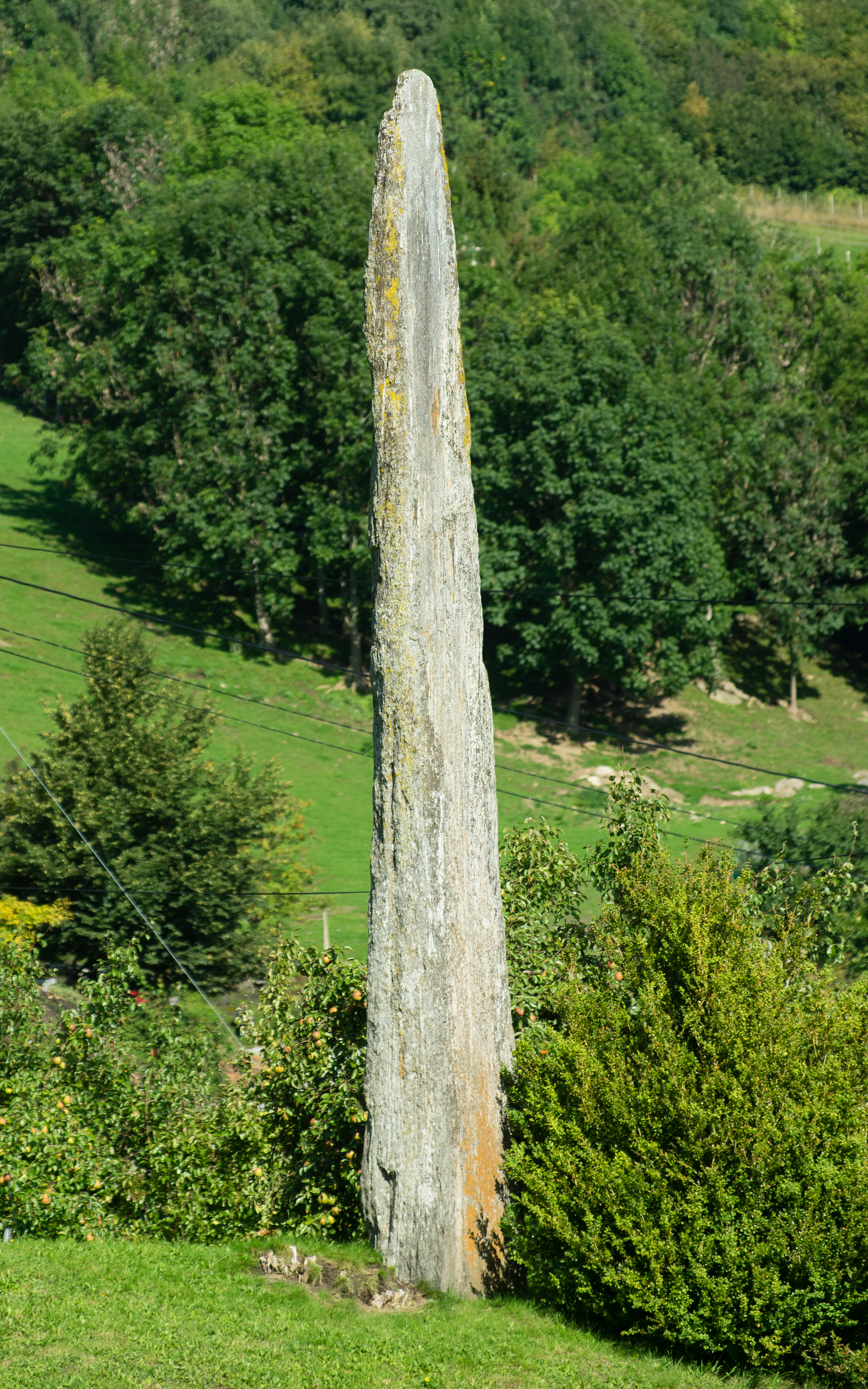 Baldersteinen i Leikanger i Sogn.